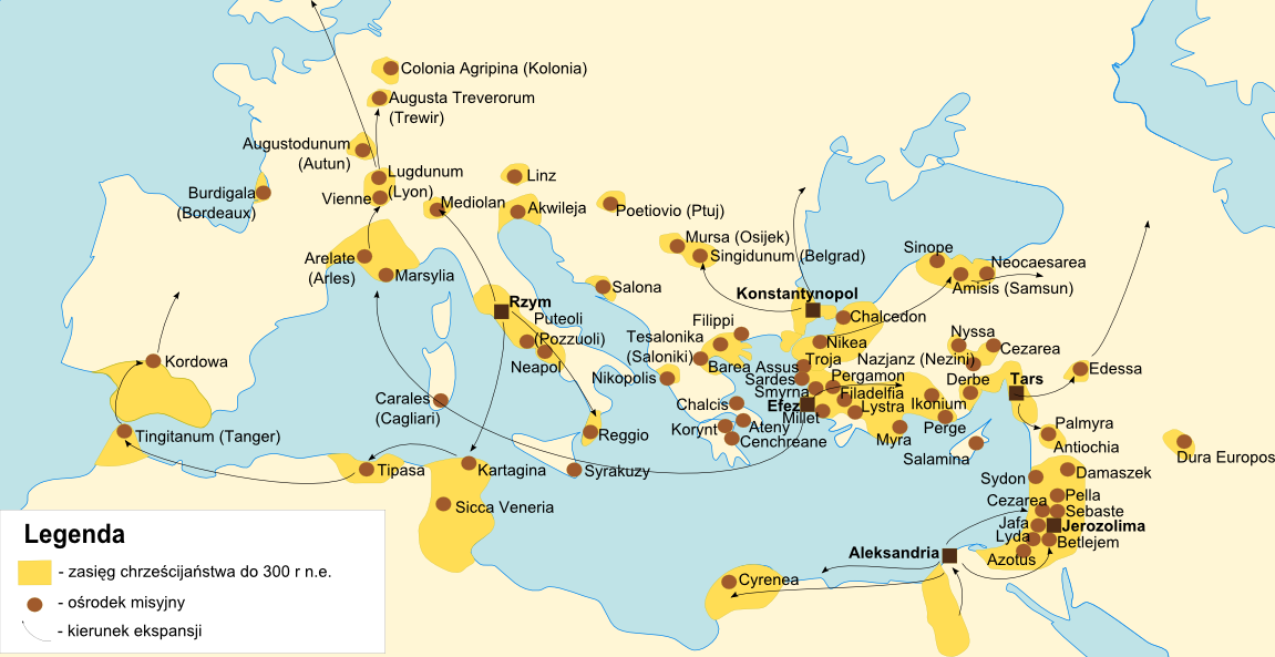 Mapa zasięgu chrześcijańastwa